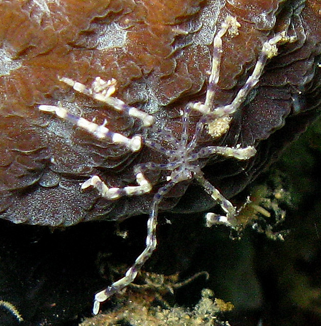 Pycnogonid